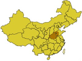 Extensión de la dinastía china Xia (siglo XXI adC - siglo XVI adC)